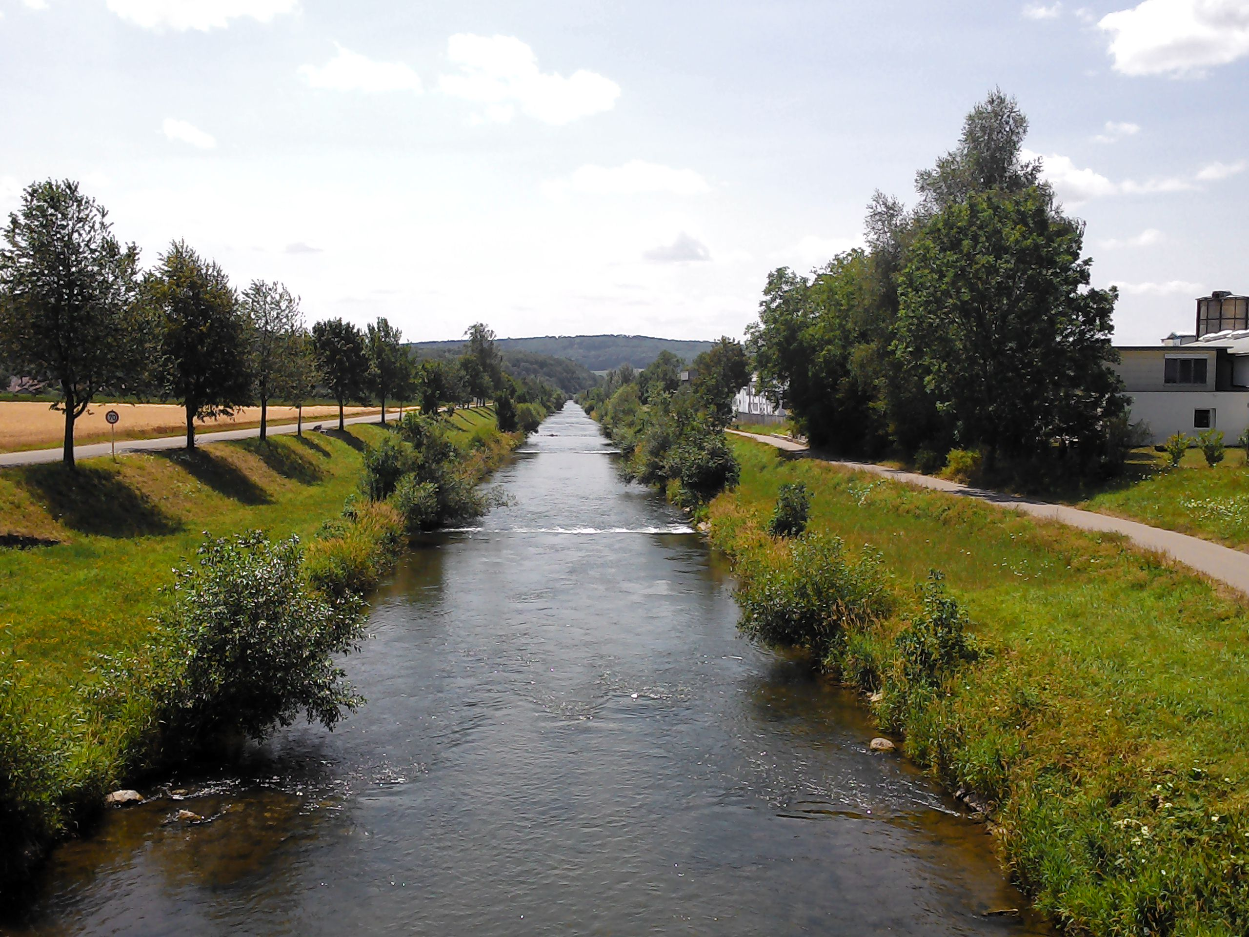 Lauf der Wutach von Wutöschingen nach Lauchringen, Landkreis Waldshut, Baden-Württemberg (Deutschland)